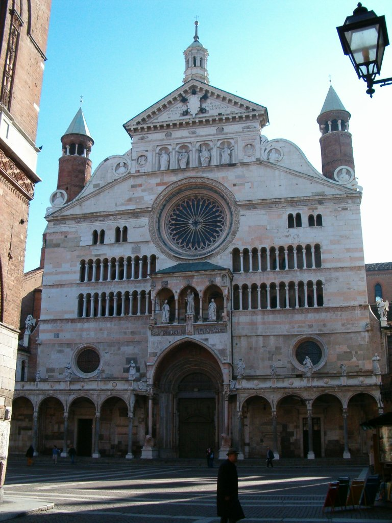 Cremona , Lombardia, Italia